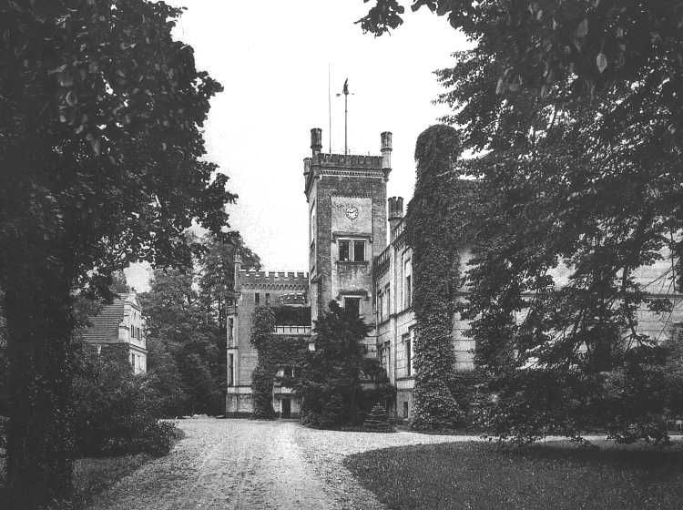 Pałac Szydłowiec Śląski rok 1915, gmina Niemodlin, powiat opolski, województwo opolskie